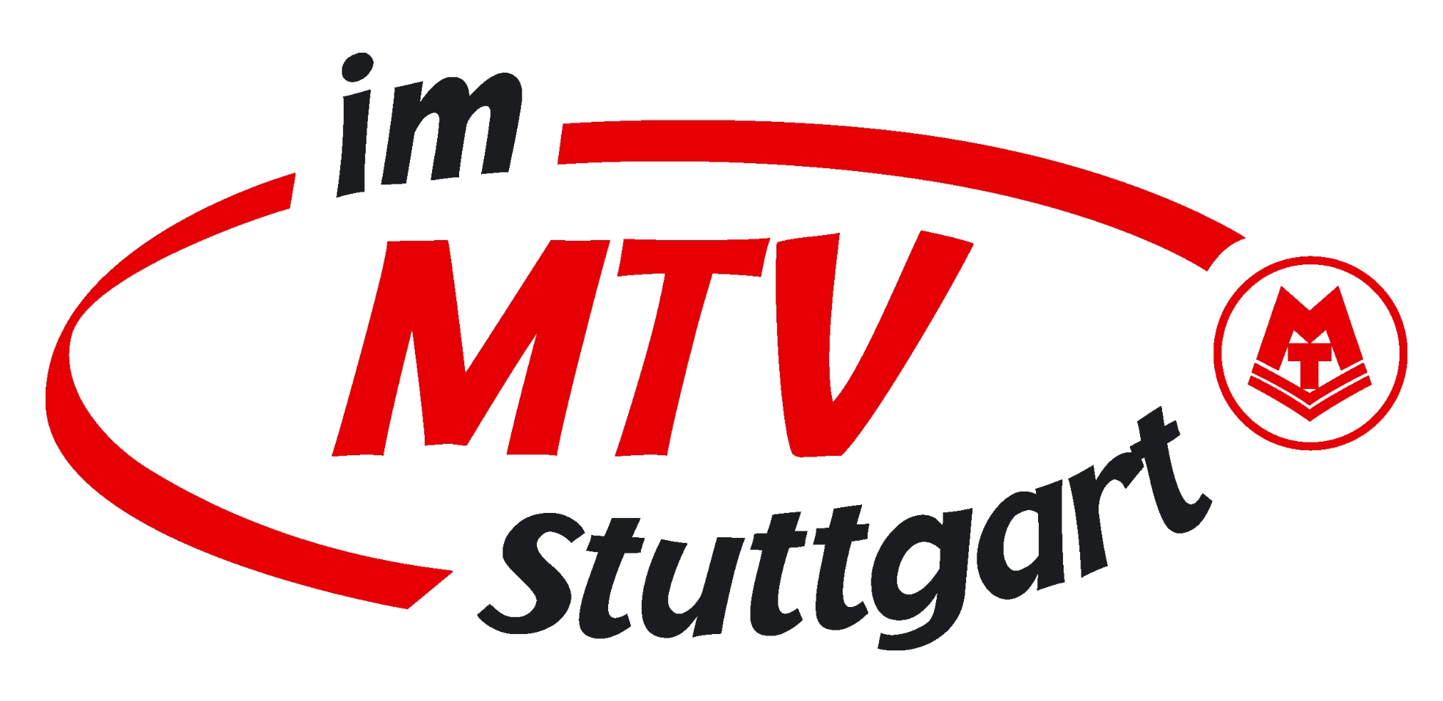 Logo im MTV Stuttgart